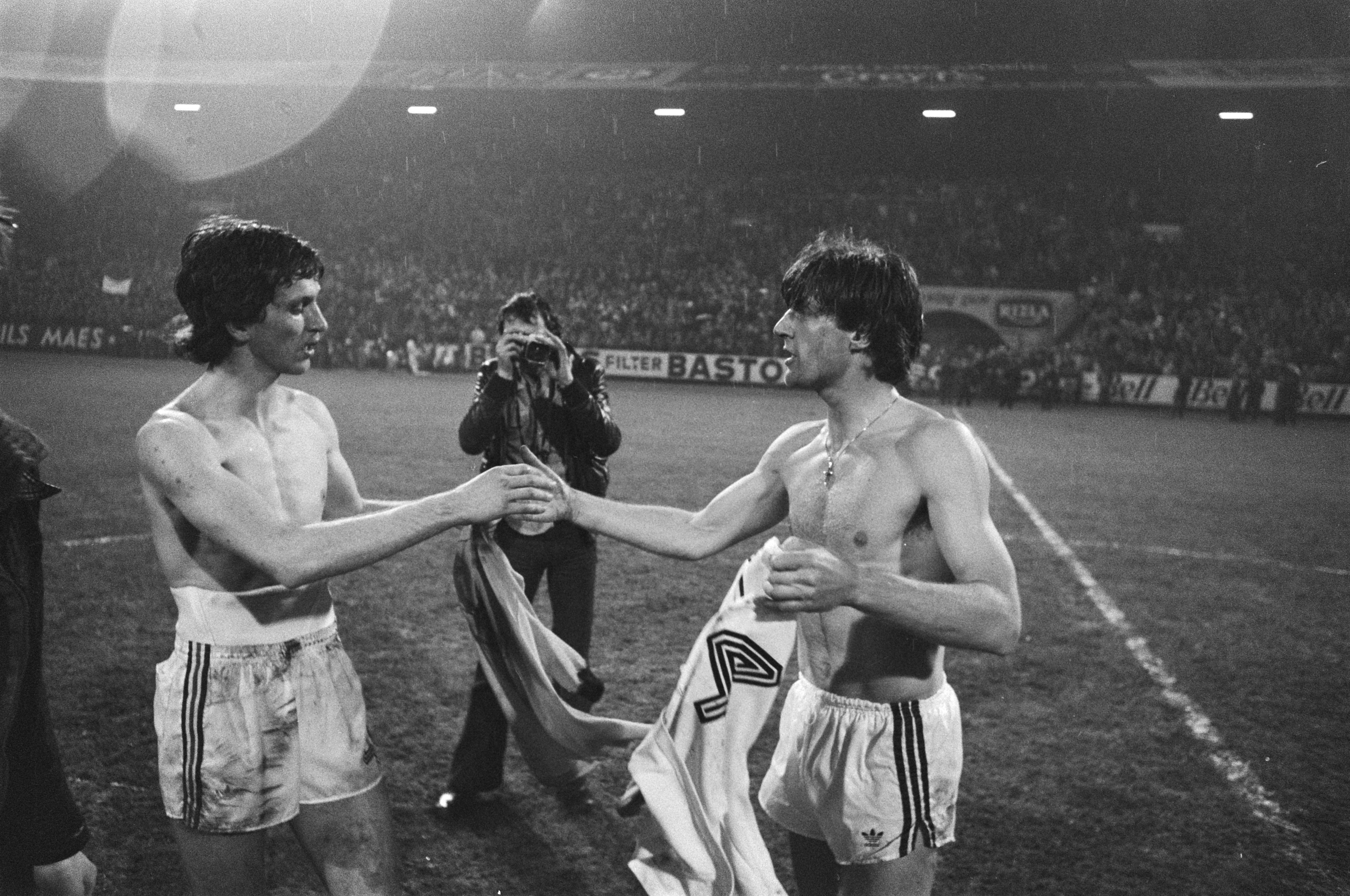 Collectie / Archief : Fotocollectie Anefo Reportage / Serie : Kwalificatiewedstrijd België - Nederland, 0-2 Beschrijving : Coeck en Krol schudden elkaar de hand en wisselen shirts Datum : 26 maart 1977 Locatie : Antwerpen, België Trefwoorden : voetbal, wedstrijden Persoonsnaam : Coeck, Ludo, Krol, Ruud Fotograaf : Verhoeff, Bert / Anefo Auteursrechthebbende : Nationaal Archief Materiaalsoort : Negatief (zwart/wit) Nummer archiefinventaris : bekijk toegang 2.24.01.05 Bestanddeelnummer : 929-0937